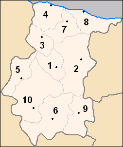 carte des obchtini (municipalités) de l'oblast de Vratsa, en Bulgarie Auteurs : Потребител:Ljubo (Любомир Таушанов = Lyoubomir Taouchanov), pour la version originale en bulgare, Utilisateur:Hégésippe Cormier, pour l'adaptation française (repères chiffrés)